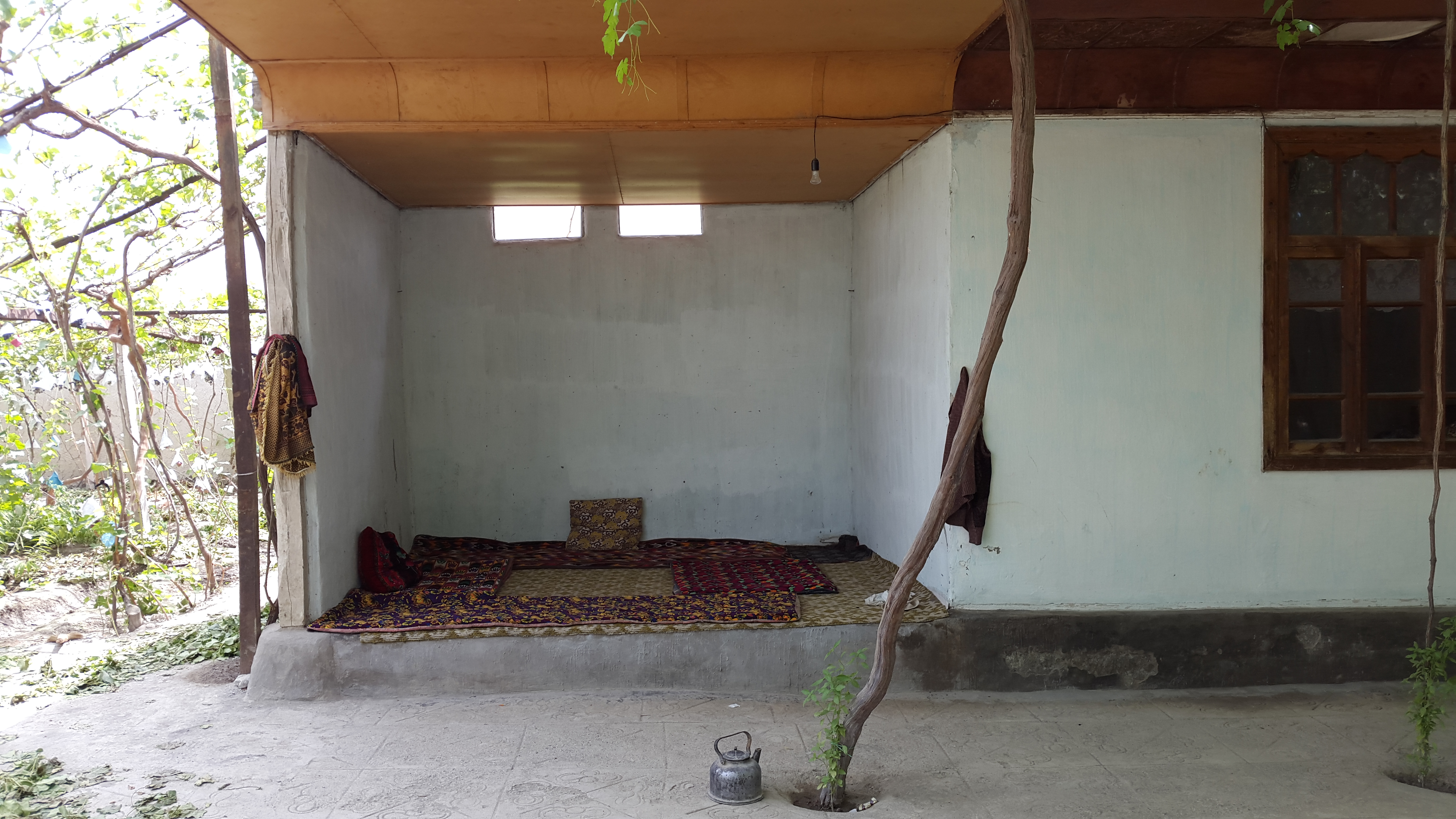 Дом в Ферганской области Узбекистана